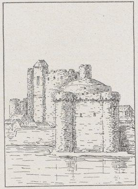 La tour Saint-Antoine et la tour Feu Hugon d'après C. Vischer et H. Piccart (XII° siècle) publié notamment dans : É.G. de Clérambault, La tour Hugon et le château de Tours in Bulletin de la Société archéologique de Touraine (BSAT), tome XVI, L. Péricat, 1907-1908, p. 240, Pl. 1